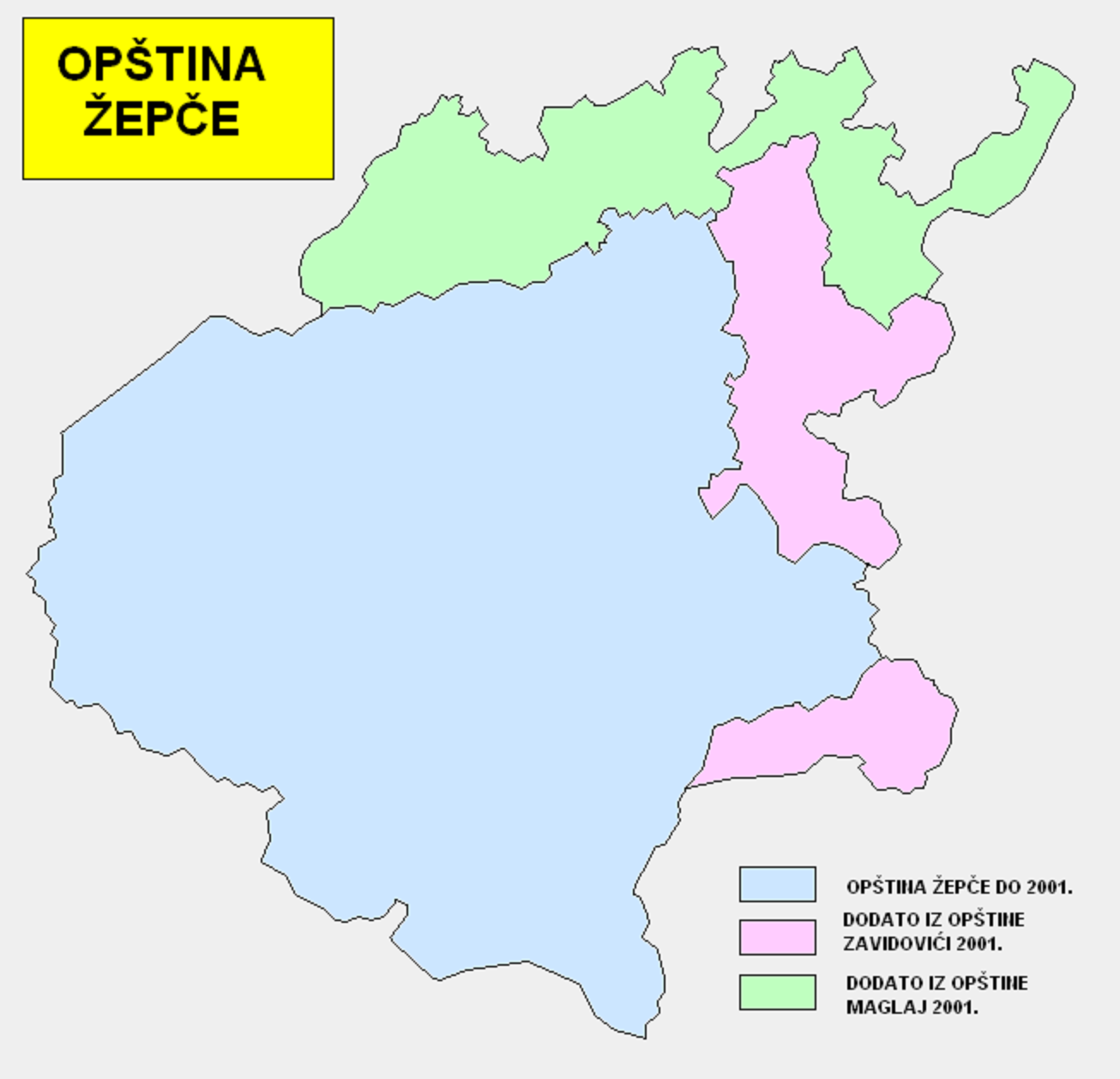 Žepče